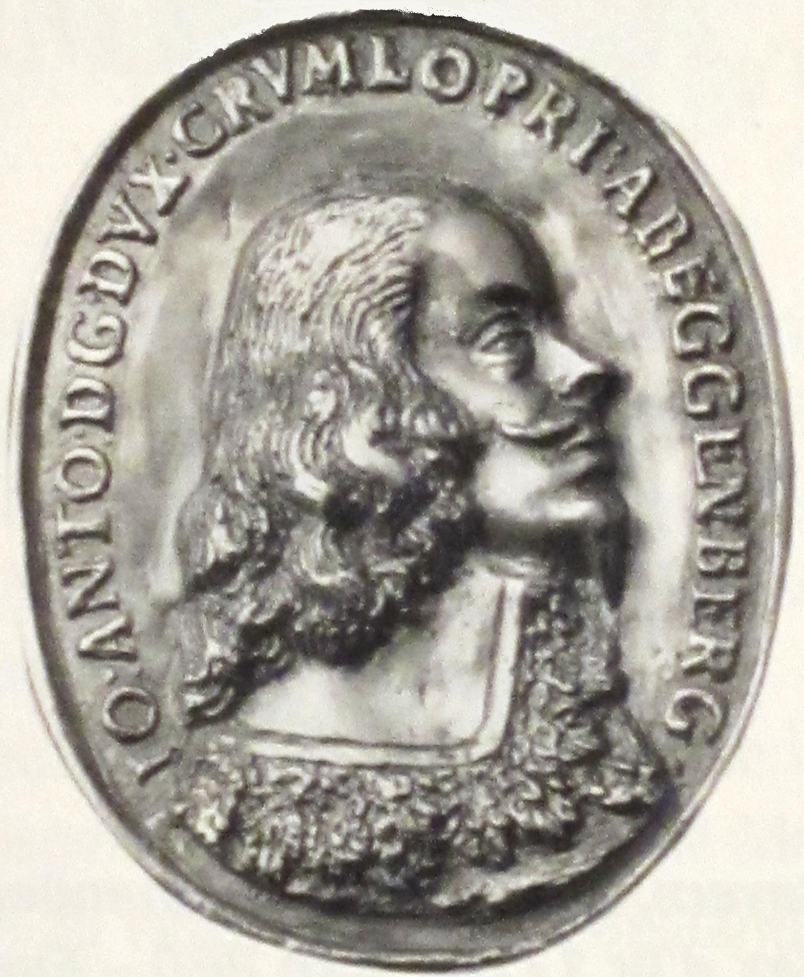 Johann August I. von Eggenberg (1610-1749), Medaille auf die Hochzeit 1639 mit Anna Maria von Brandenburg-Bayreuth